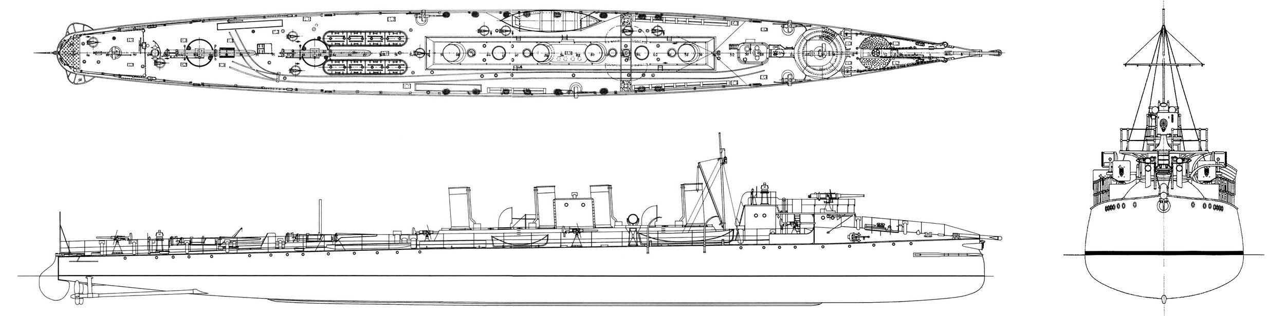 Создано по материалам архивов РГАВМФ (Ф. 421, Оп.12)